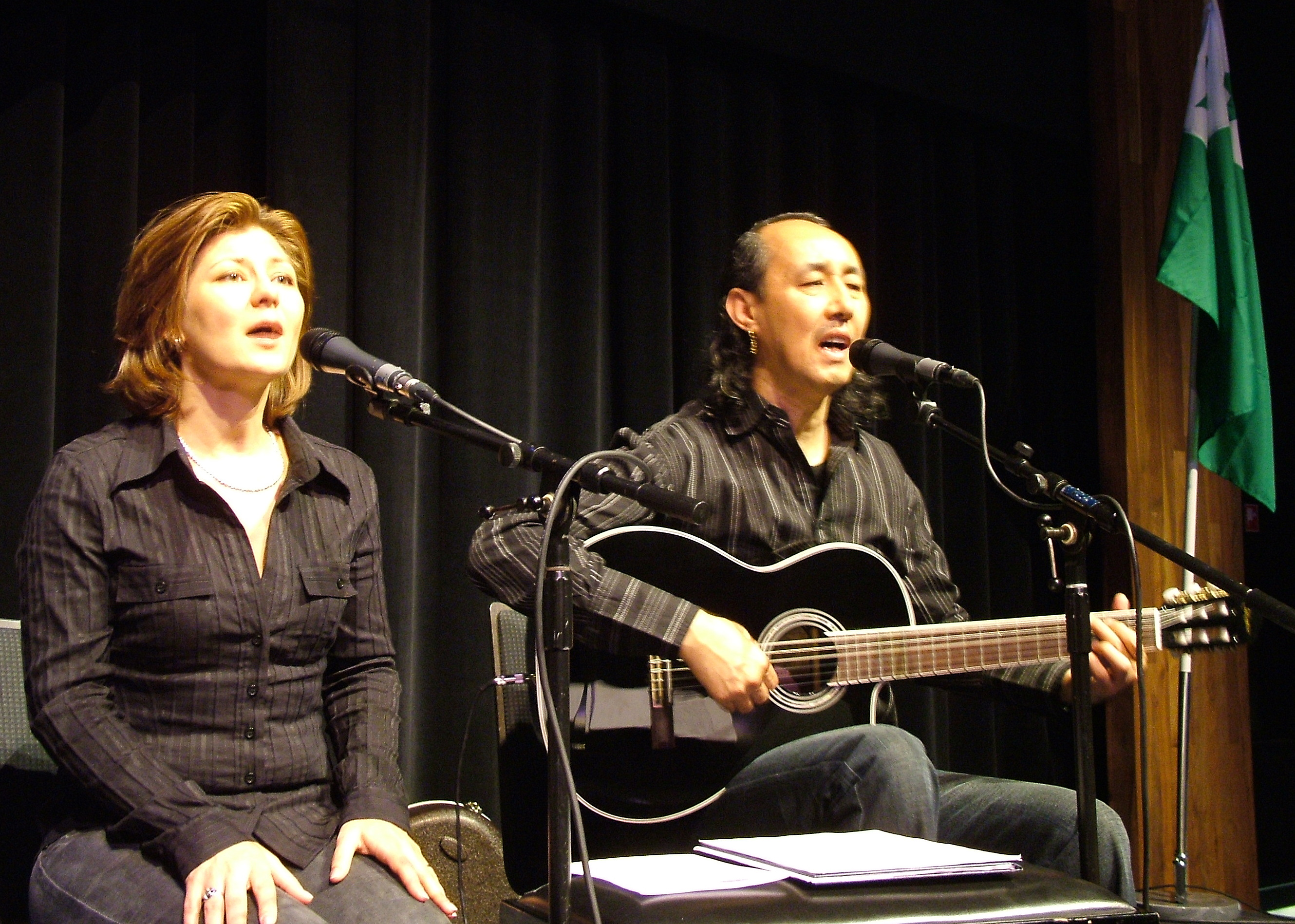 Universala Kongreso de Esperanto, Roterdamo 2008. Koncerto de Jxomart kaj Natasxa.